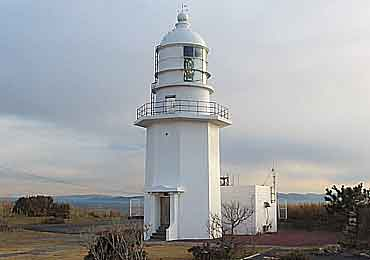 Tsurugisaki Lighthouse, Miura, Kanagawa, Japan